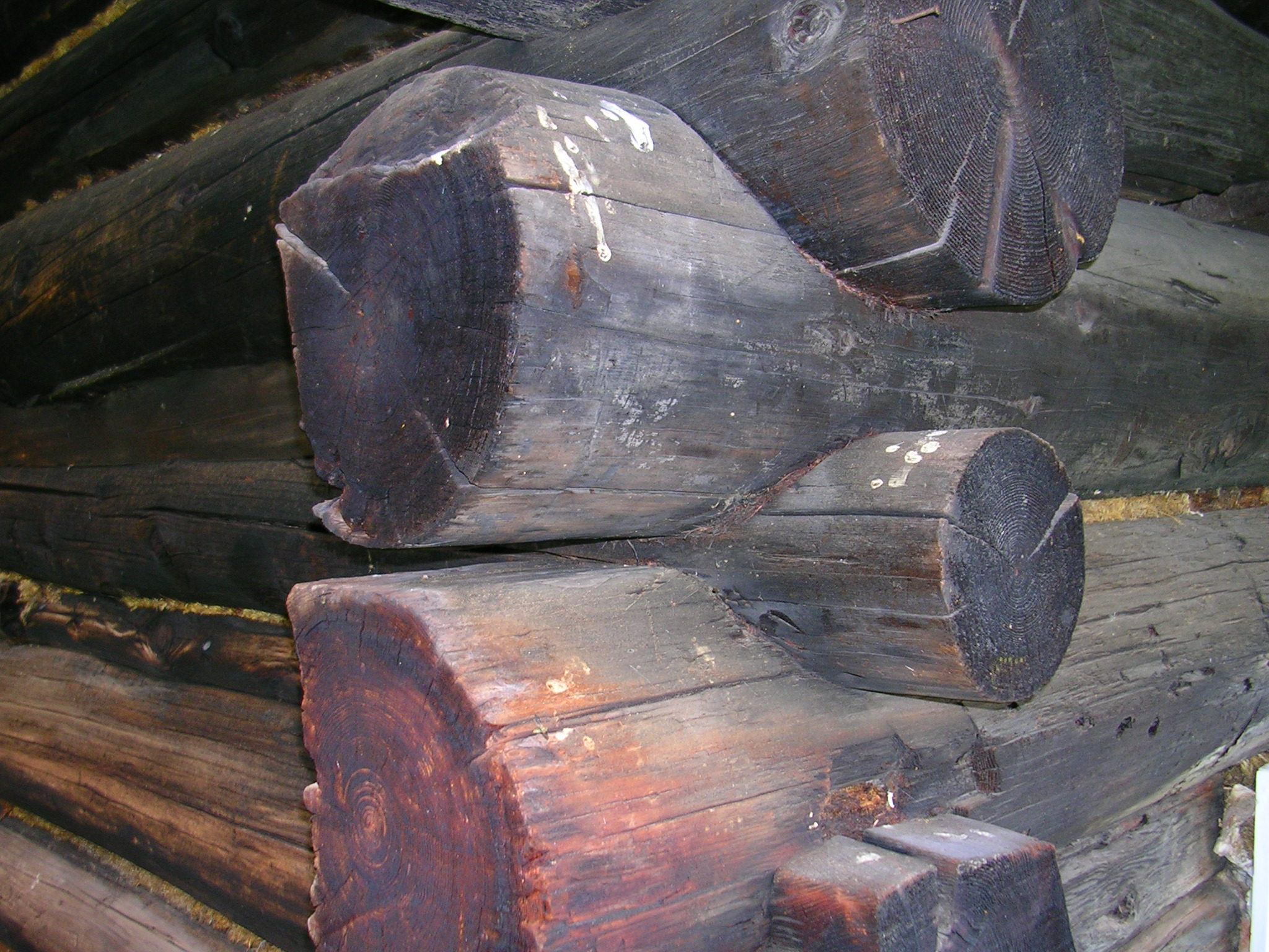 Eckverband in Rundholz